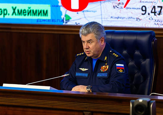 Главнокомандующий ВКС России представил фактическую картину атаки 24 ноября турецкого истребителя F-16 на российский самолет Су-24М в небе над Сирией